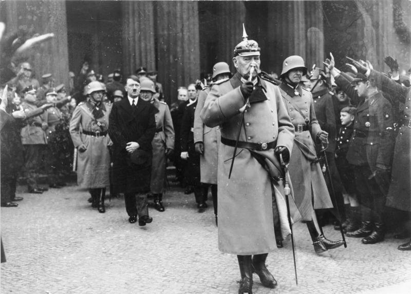 Volkstrauertag am 25. Februar 1934 in Berlin. Reichspräsident von Hindenburg und der Reichskanzler verlassen das Ehrenmal Unter den Linden. [Neue Wache]